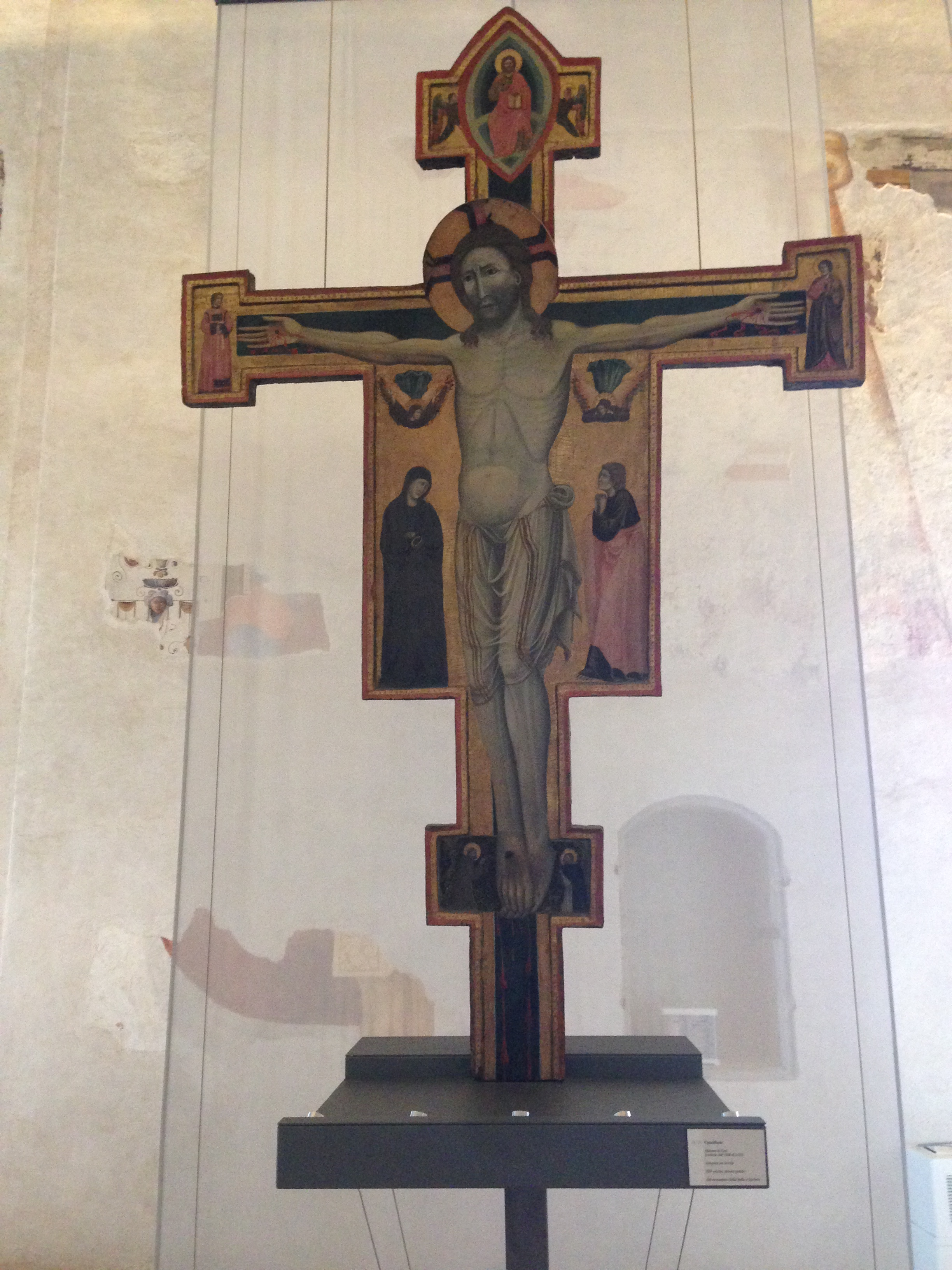 Crocifisso. Maestro di Cesi. Spoleto. Tempera su tavola, primo quarto del XIV secolo (cm. 245 X 158)